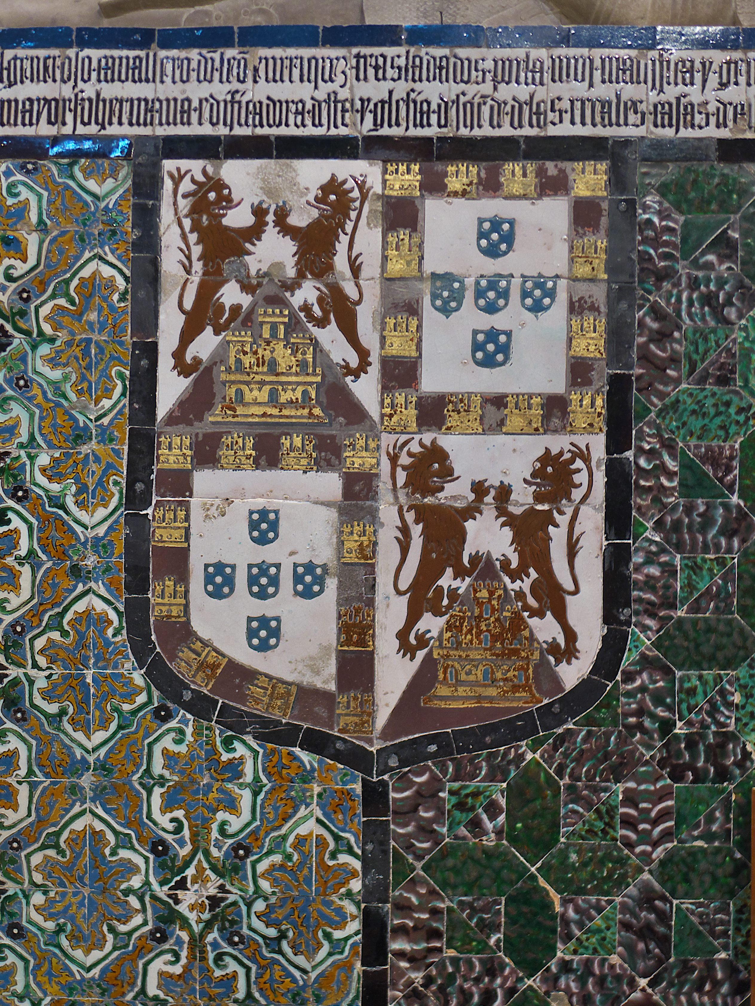 Covento de Santa Paula (Sevilla). Escudo procedente del sepulcro (s. XVI) de León Enríquez (León de Noroña), hijo de Pedro Enríquez de Noroña. Azulejo de cuerda seca.